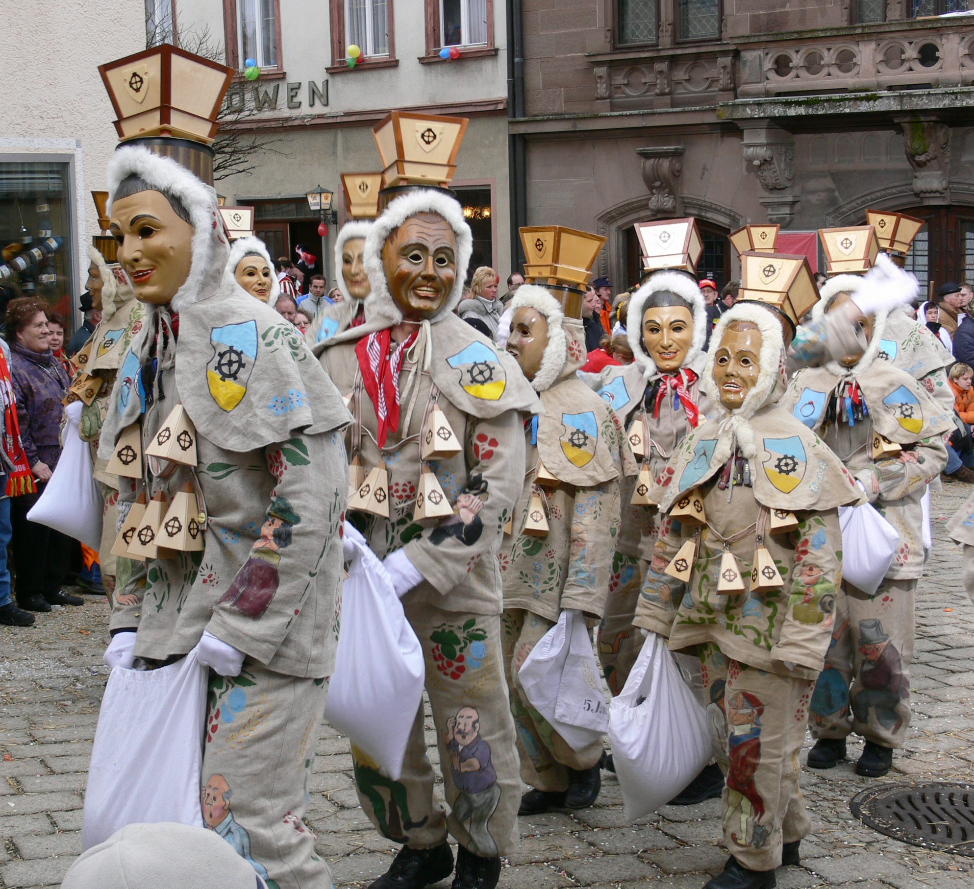 Narrenzunft Mühlheim an der Donau, Figur: Schellennarr Veranstaltung: Narrensprung beim Narrentreffen Meßkirch 2006